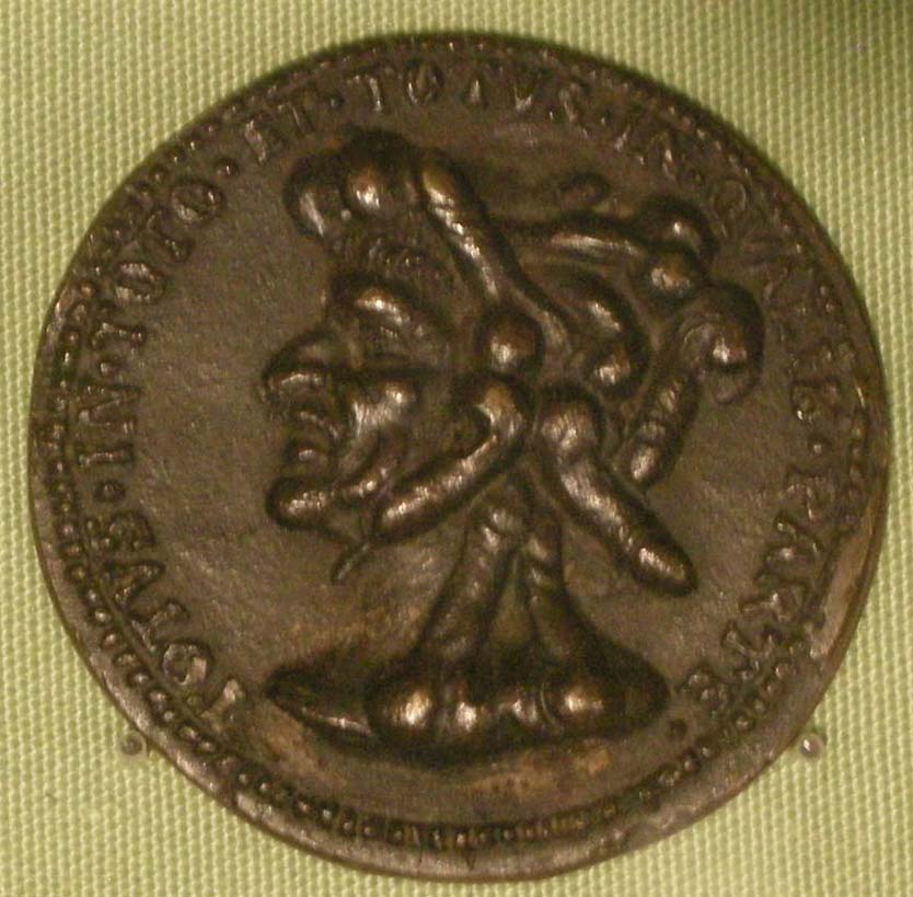 Medaglia di pietro aretino, verso con testa di falli